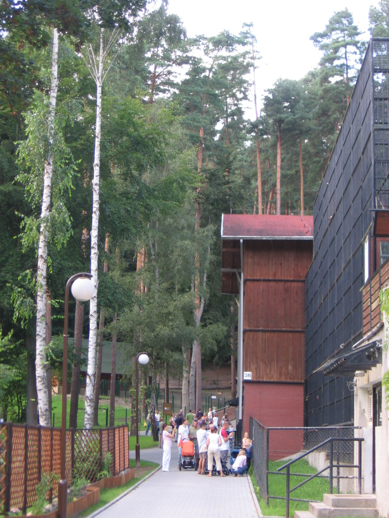 Miejski Ogród Zoologiczny Wybrzeża